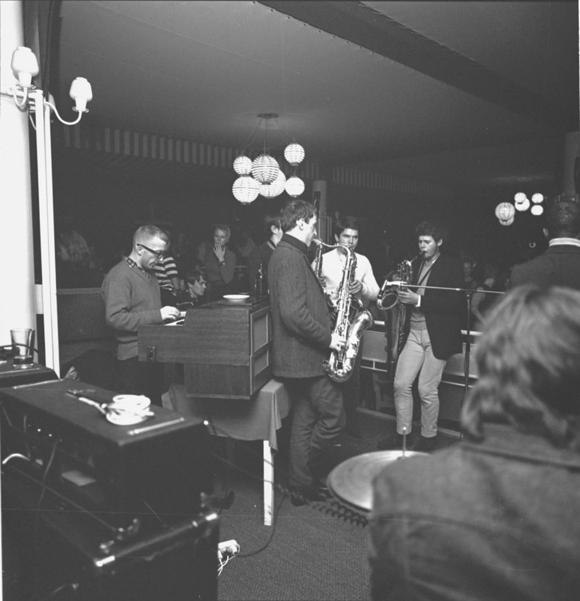 The Sapphires (etablert 1965 i Oslo, nedlagt 1968) var et norsk rytme-og-blues band, kjent fra plateutgivelser og fremførelser på Club 7.